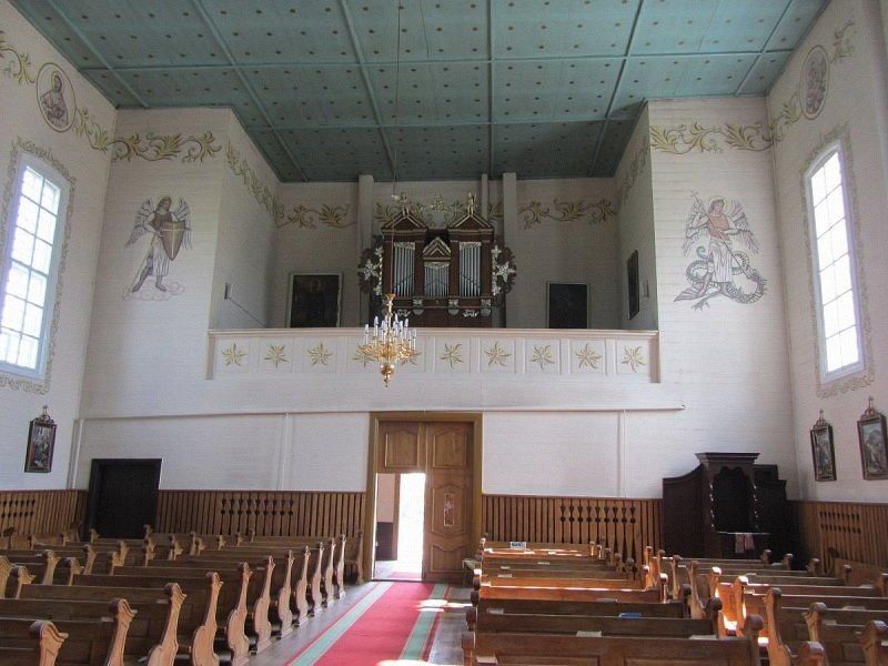 Воўпа. Касцёл Святога Яна Хрысціцеля